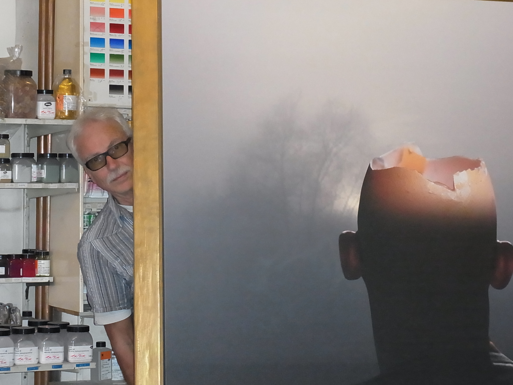 Leinwände aufspannen ist harte körperliche Arbeit